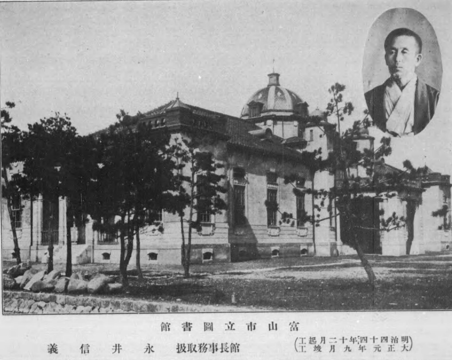 1909年（明治42年）9月の皇太子嘉仁親王行啓を紀念して創設された富山市立図書館とその館長であった永井信義。